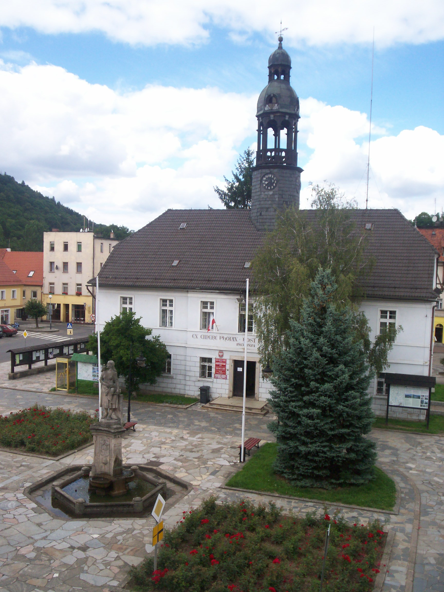 Ratusz we Wleniu